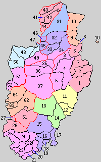 静岡県田方郡、賀茂郡の町村。